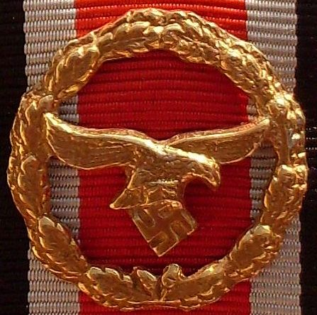 Ehrenblattspange der Luftwaffe (links 57er Version, rechts stiftungsmäßige Ausführung)